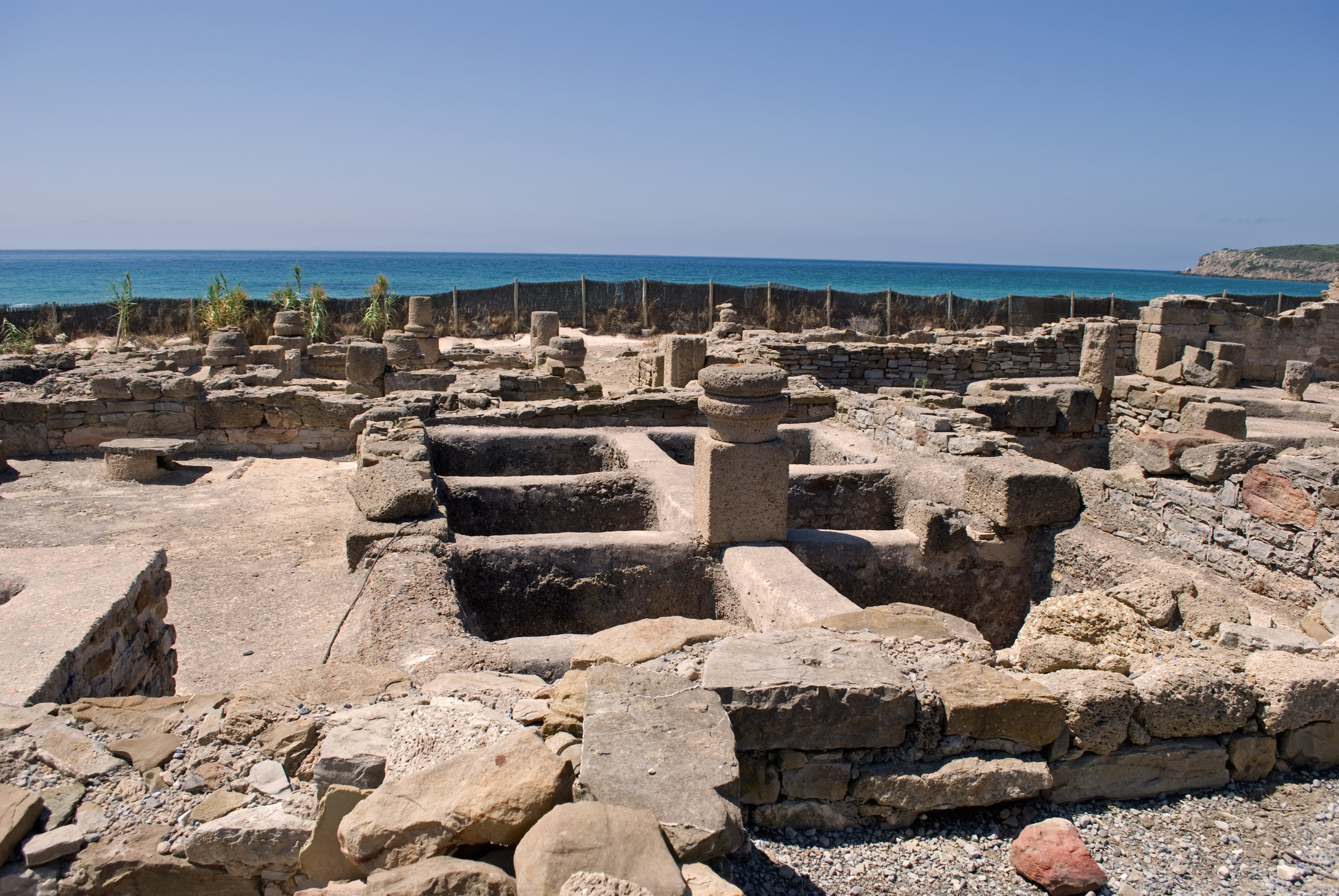 Factoría de salozones y garum de la ciudad romana de Baelo Claudio, Tarifa, provincia de Cádiz, en España